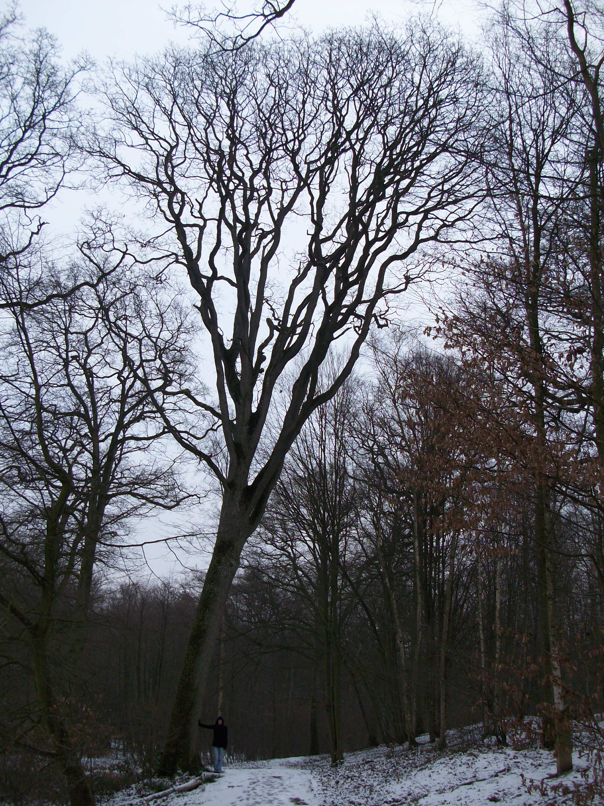 forme du houppier d'un chêne sessile photo prise dans le nord pas de calais